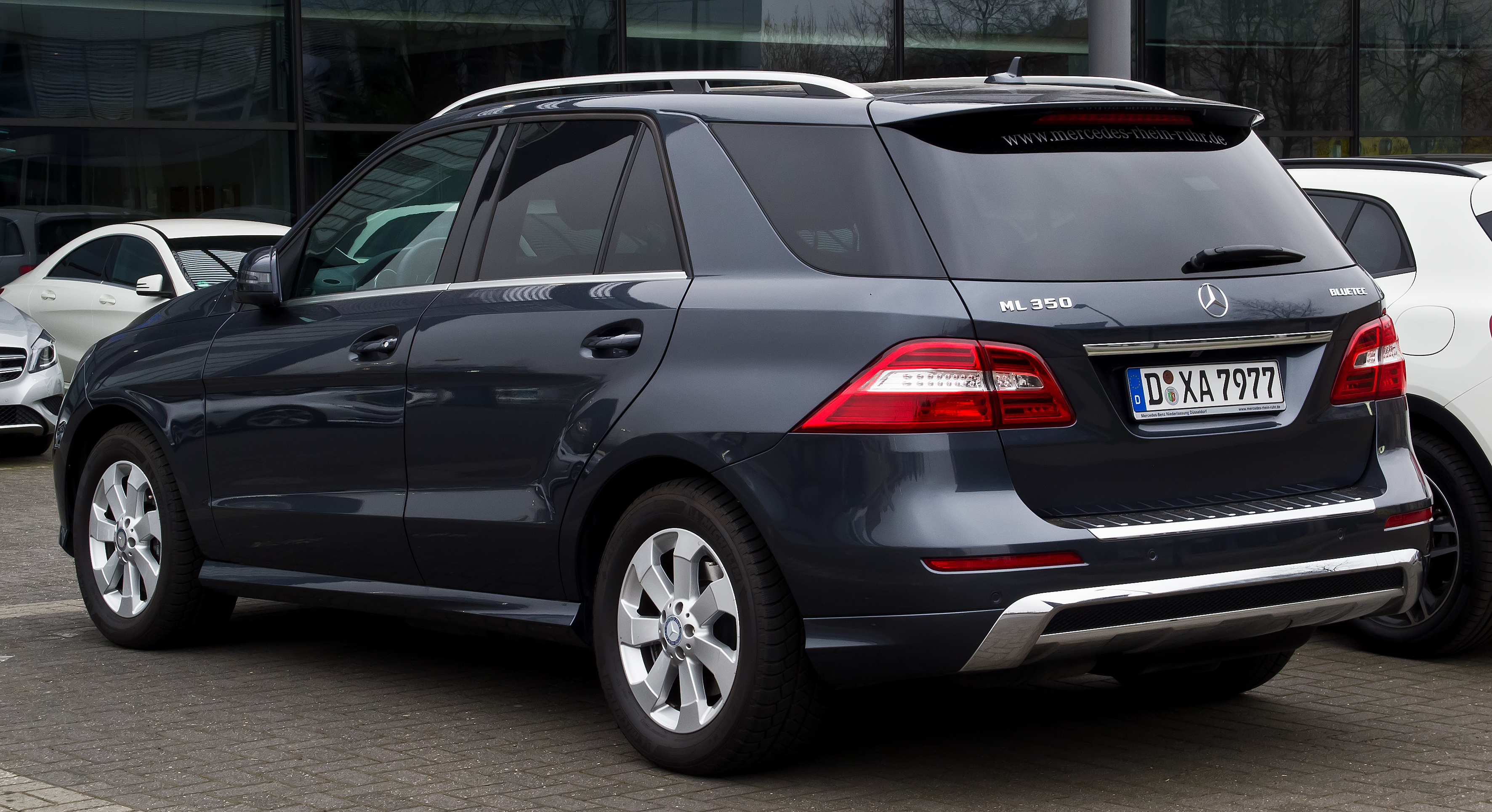 Mercedes-Benz ML 350 BlueTEC 4MATIC Sport-Paket AMG (W 166)